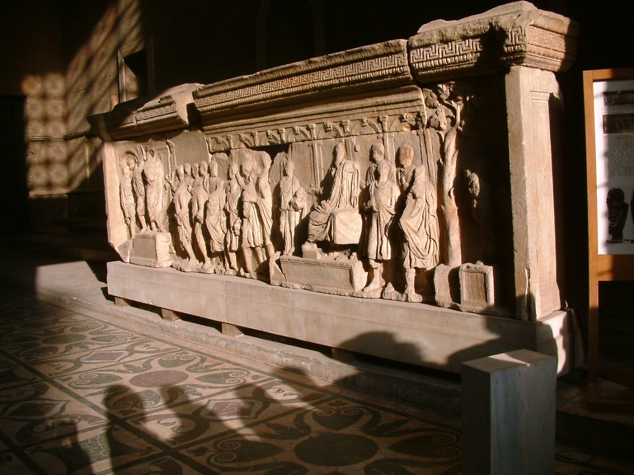 Curia Iulia a Roma: fregio romano (destro). Si noti il pavimento in opus sectile.